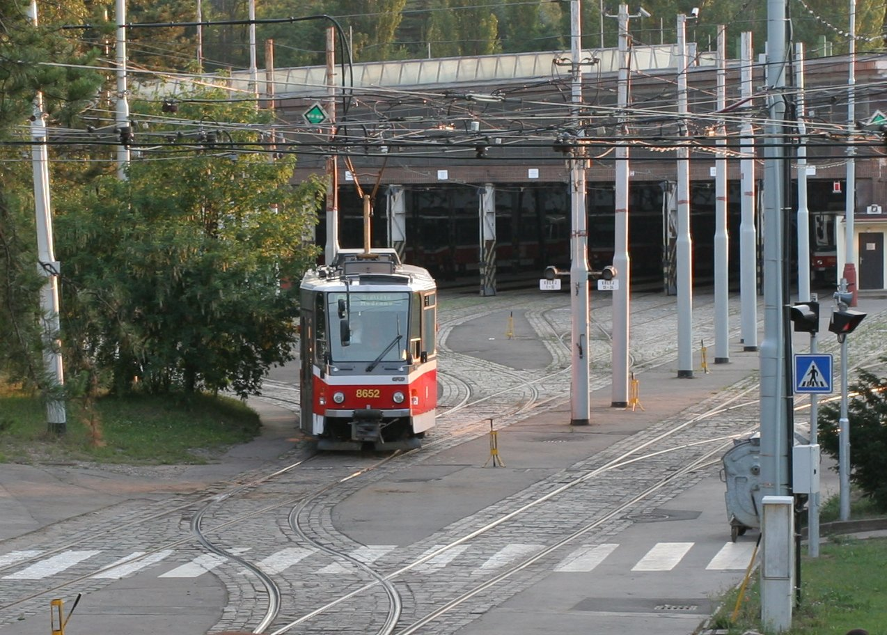 Vozovna Motol, Praha